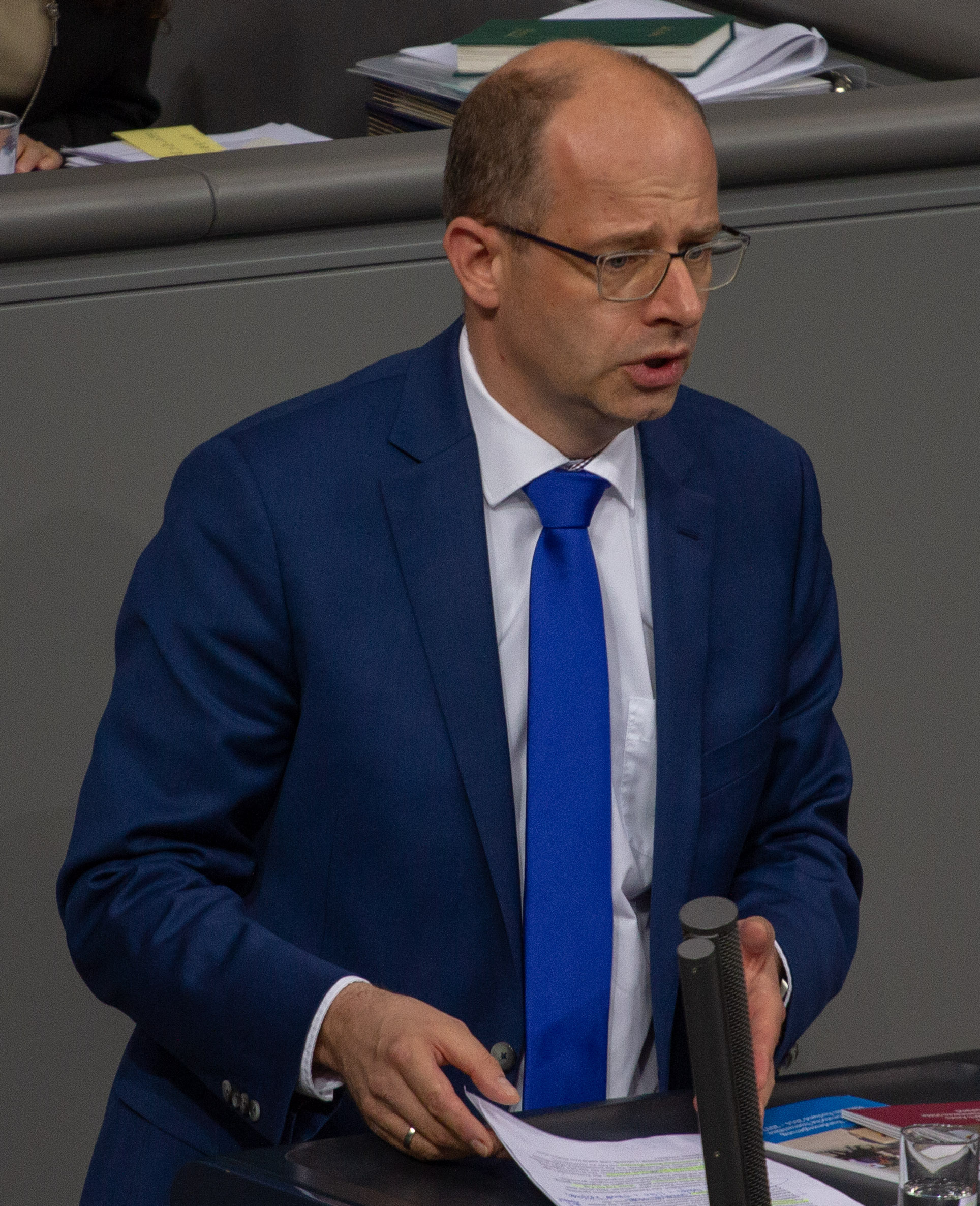 Michael Brand, Mitglied des Deutschen Bundestages, während einer Plenarsitzung am 11. April 2019 in Berlin.